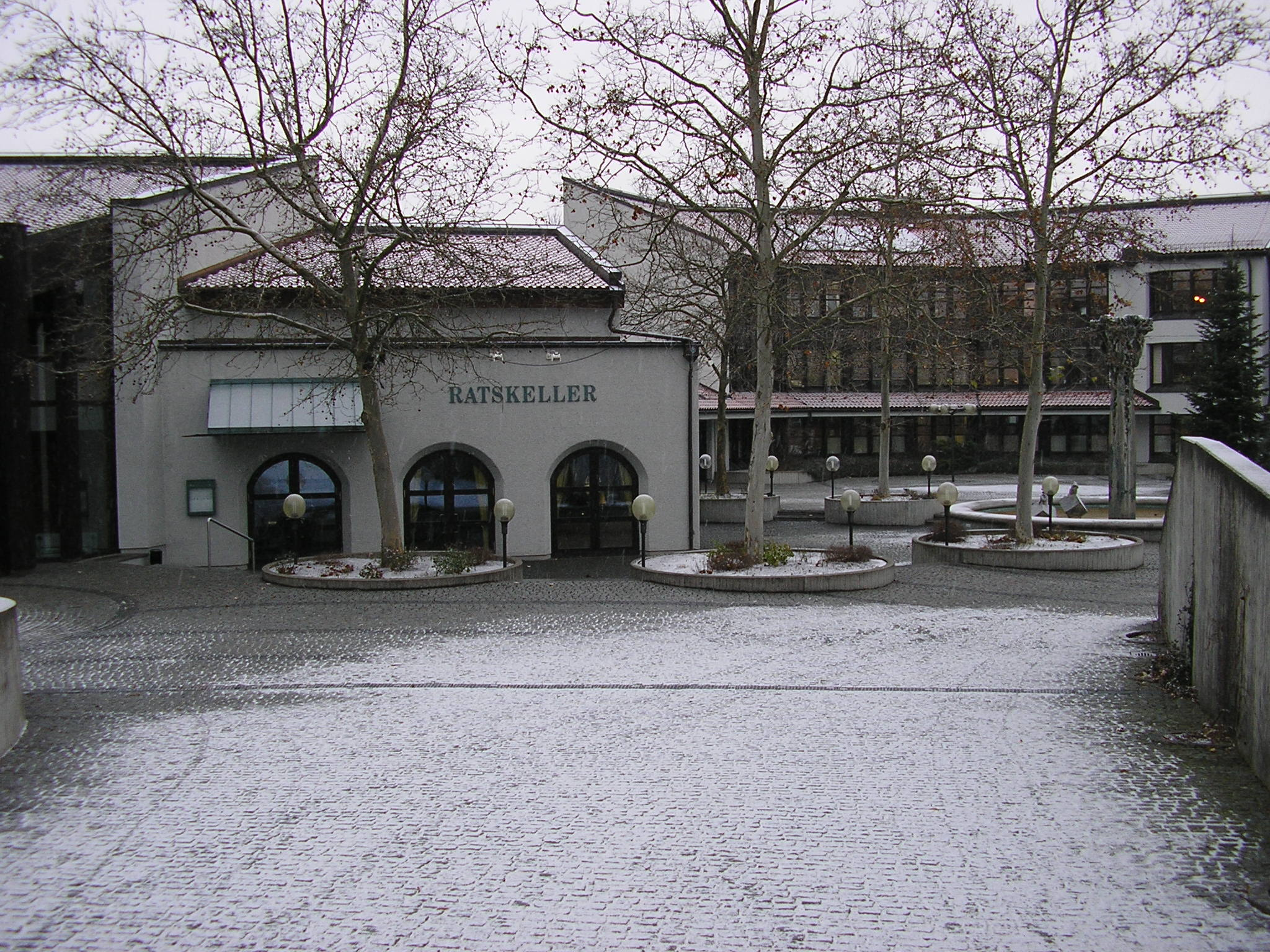 Rathaus (rechts) und Ratskeller erbaut auf dem Kellergeschoss des ehemaligen Casinos der Messerschmitt-Werke. Dies diente im unfertigen Bauzustand von Feb.-April 1945 als Unterkunft für die Häftlinge des KZ-Außenkommando Obertraubling.